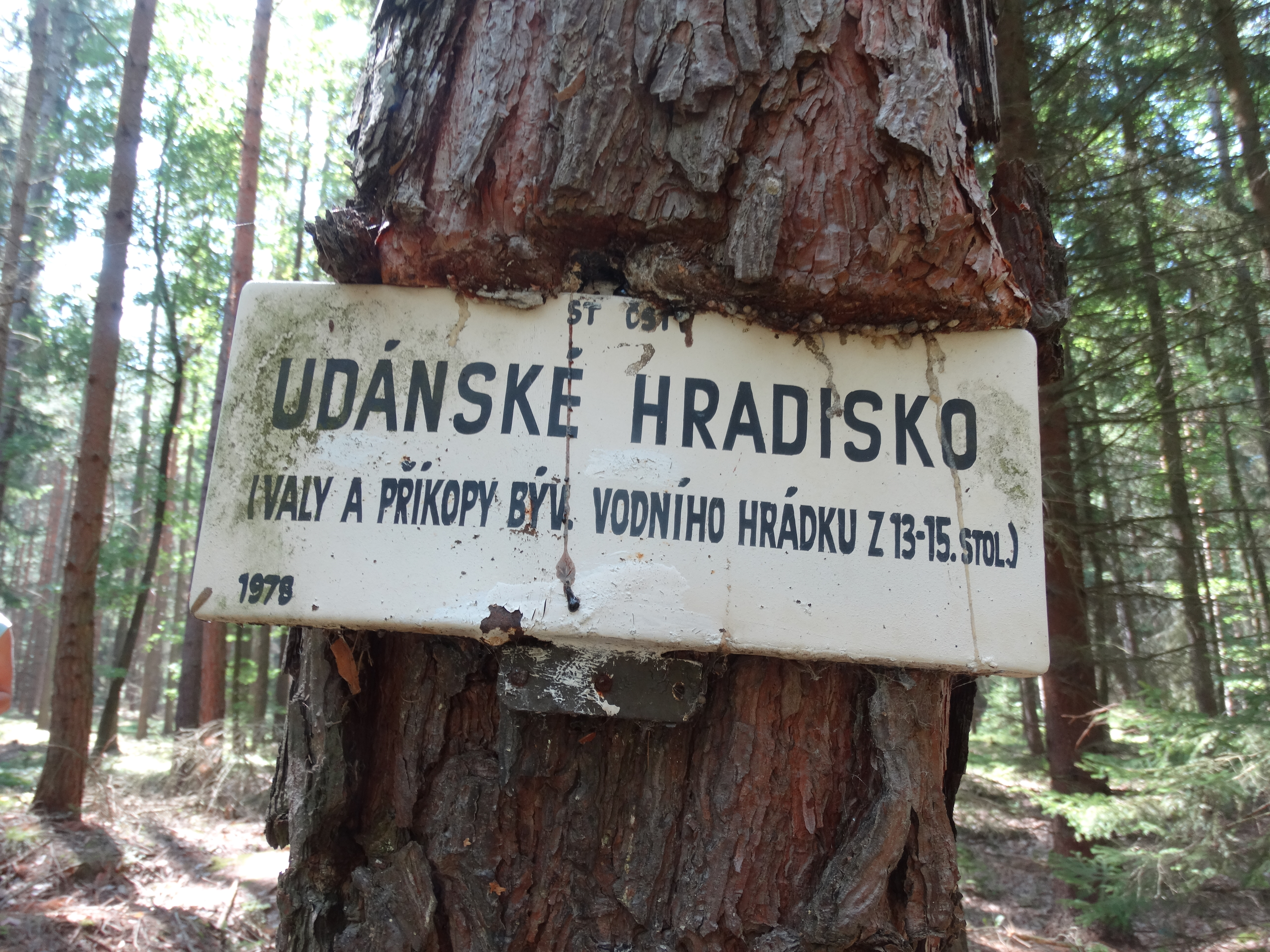 informační tabule